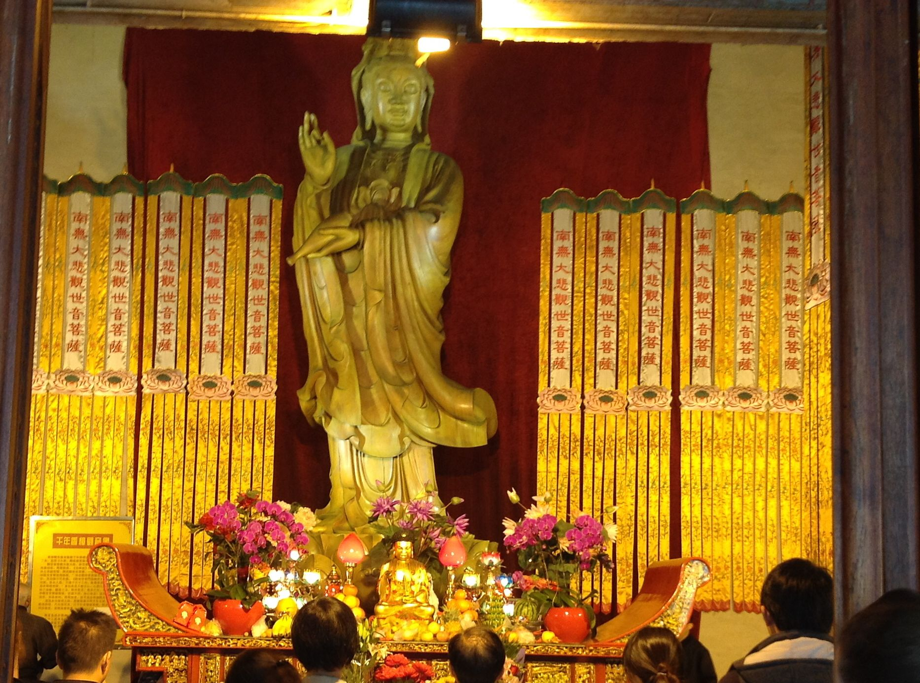 Jade Buddha im Jing'an Tempel in Shanghai